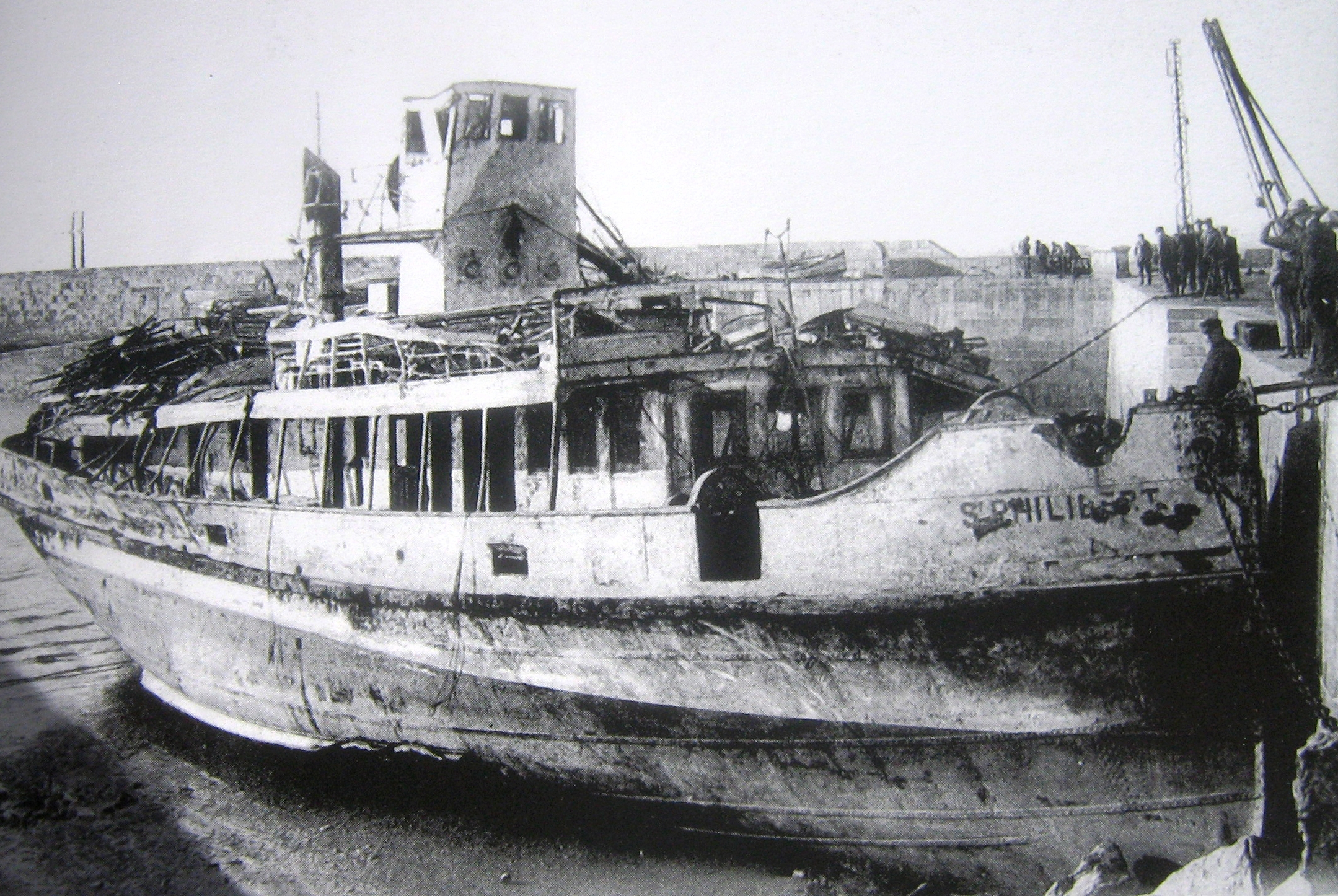 Saint-Philibert (bateau renfloué)